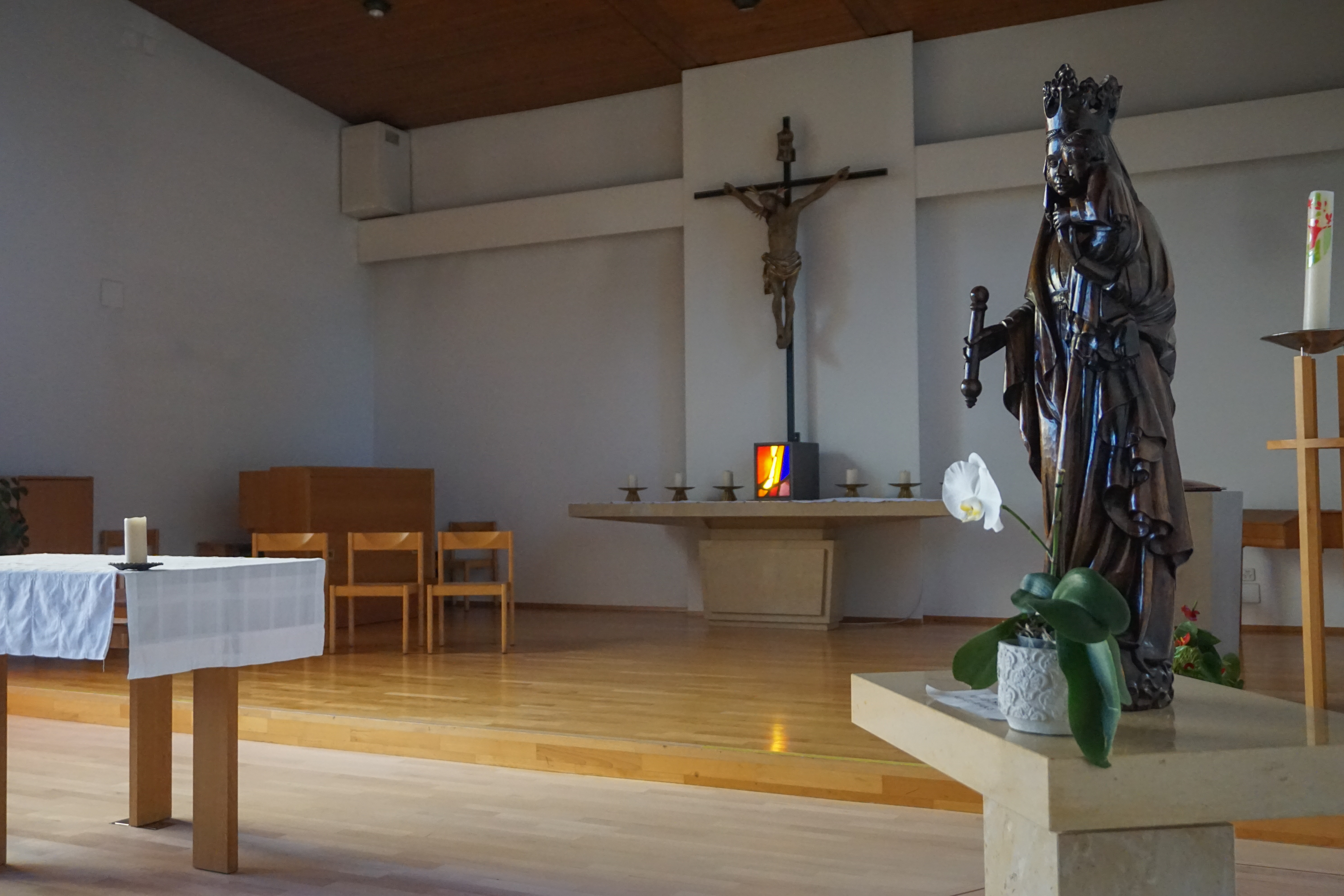 Inneres mit Altarraum